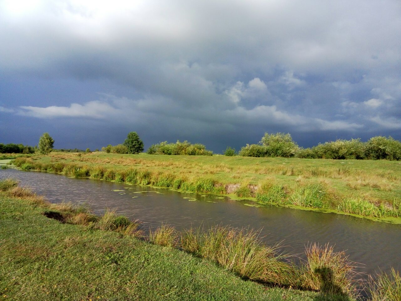 В 90-х роках проводились осушувальні роботи.